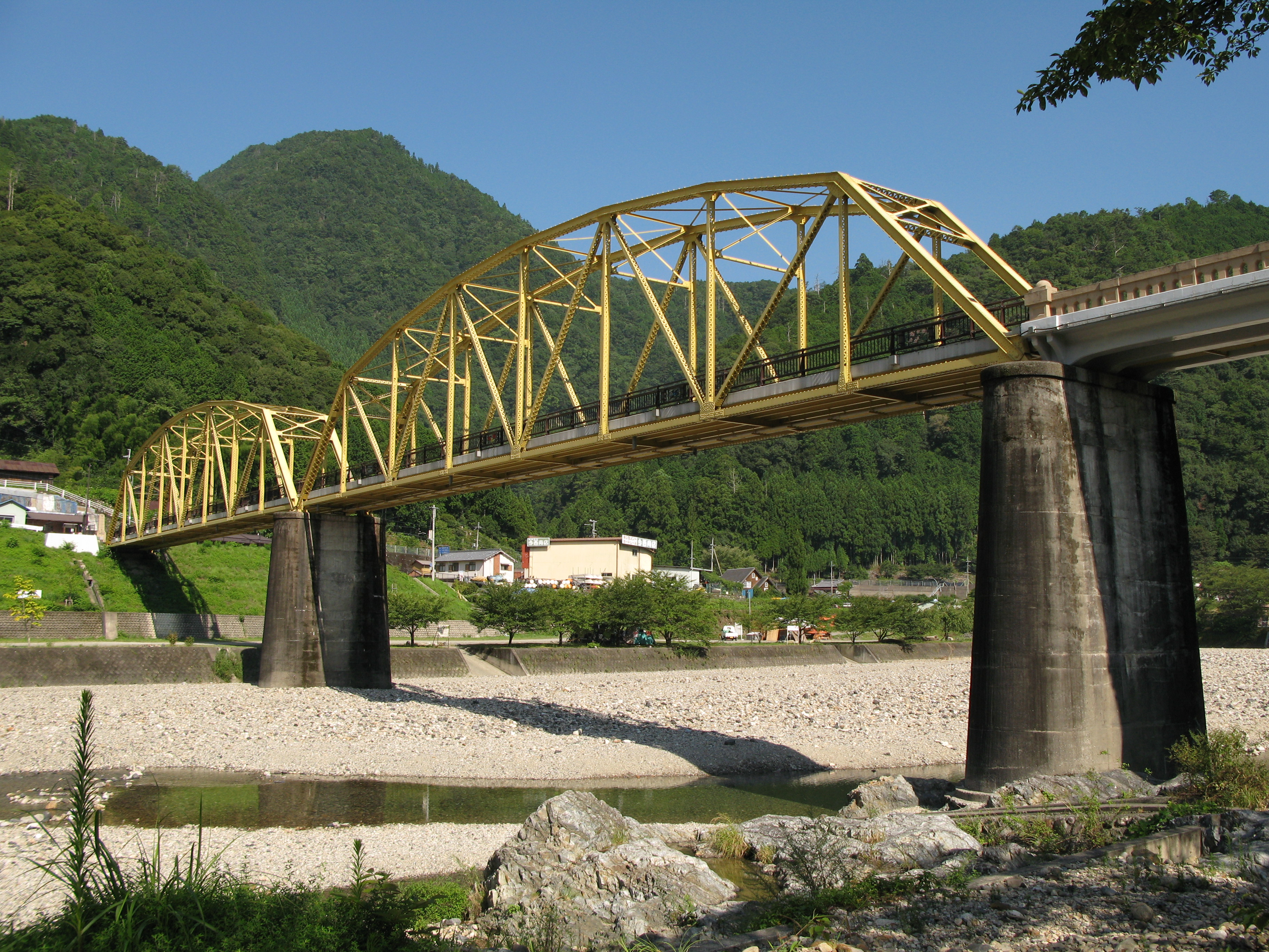 Ikehara-bridge, Shimokitayama, Nara, Japan